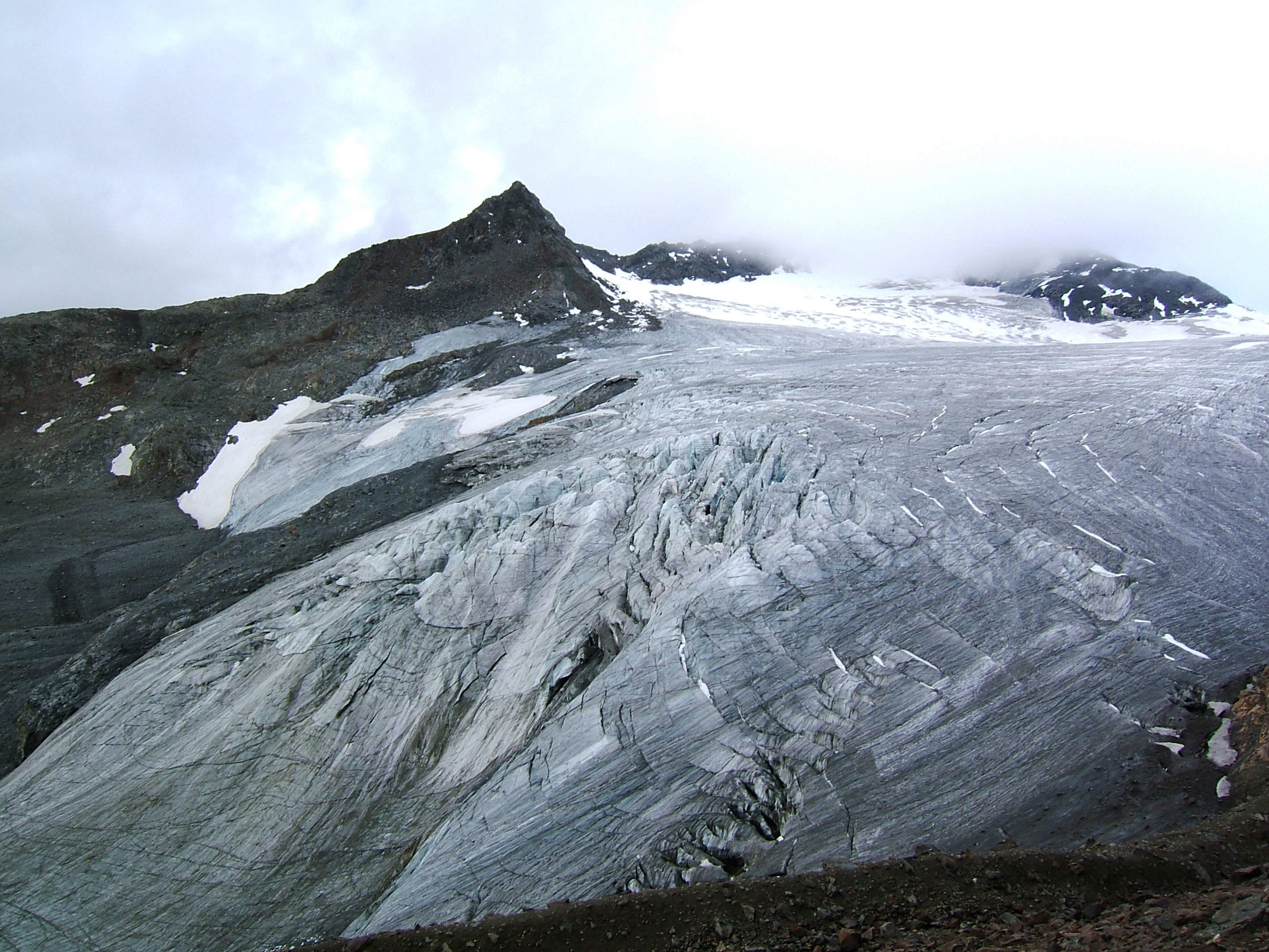 Eisbruch des Kesselwandferners vom Deloretteweg, dem Anstieg zum Brandenburger Haus. Hinten die Mutspitze, rechts davon die Vordere Hintereisspitze in Wolken